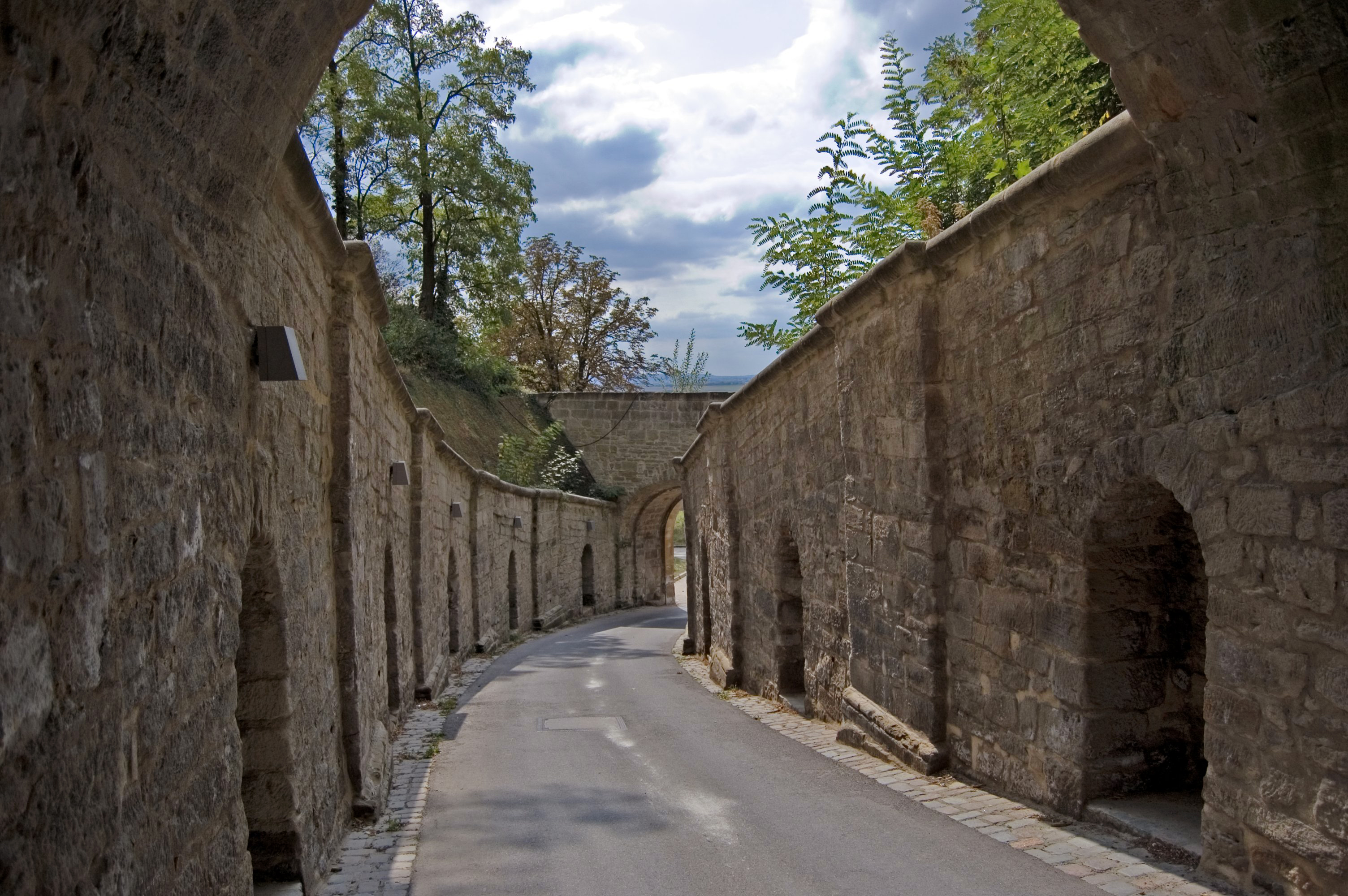 Zufahrt zur Festung Hohenasperg Justizvollzugskrankenhaus